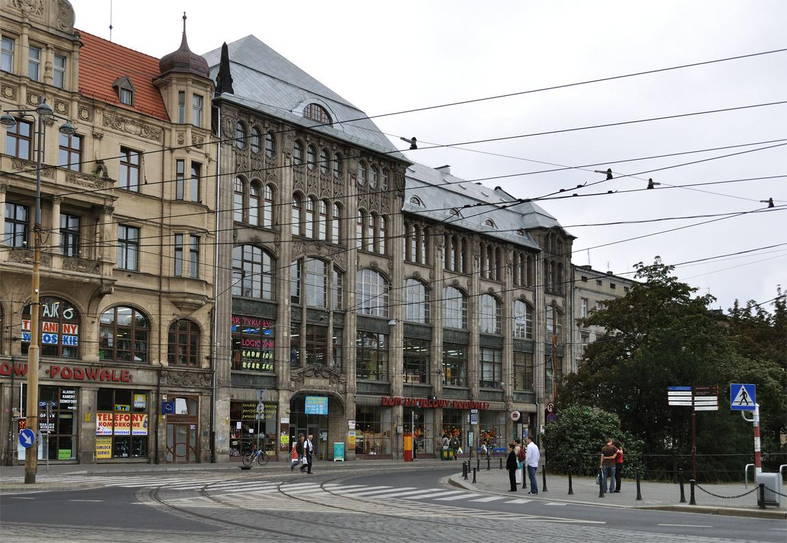 Zachodni budynek należący do DH "Podwale".